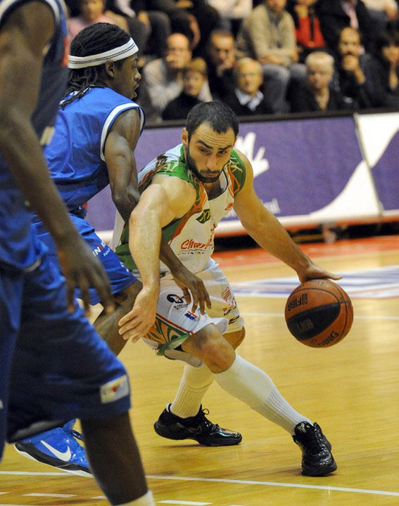 Angelo Tsagarakis - Bourg-en-Bresse/Charleville-Mézières (Saison 2010-2011)